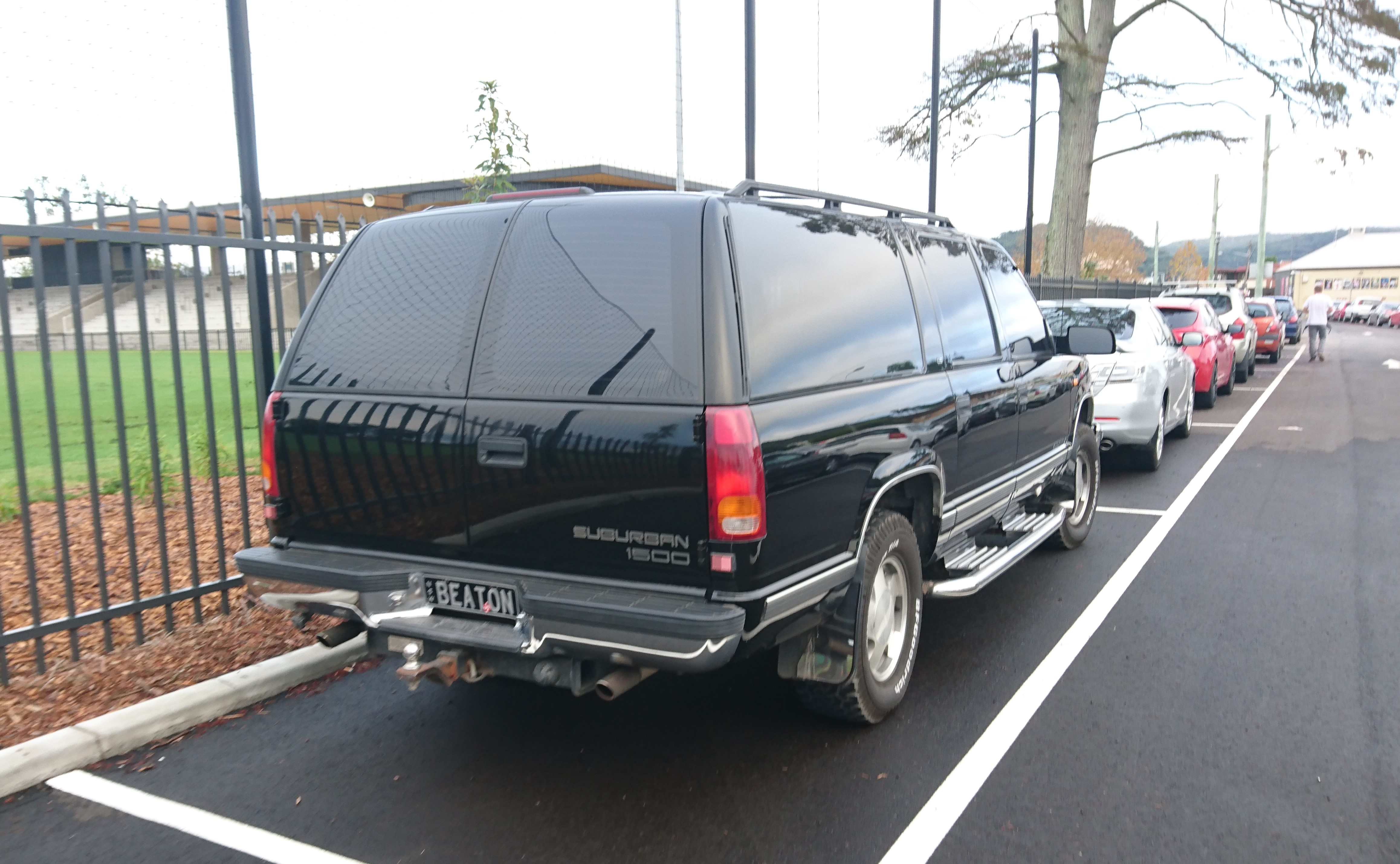 Chevrolet Suburban 1500